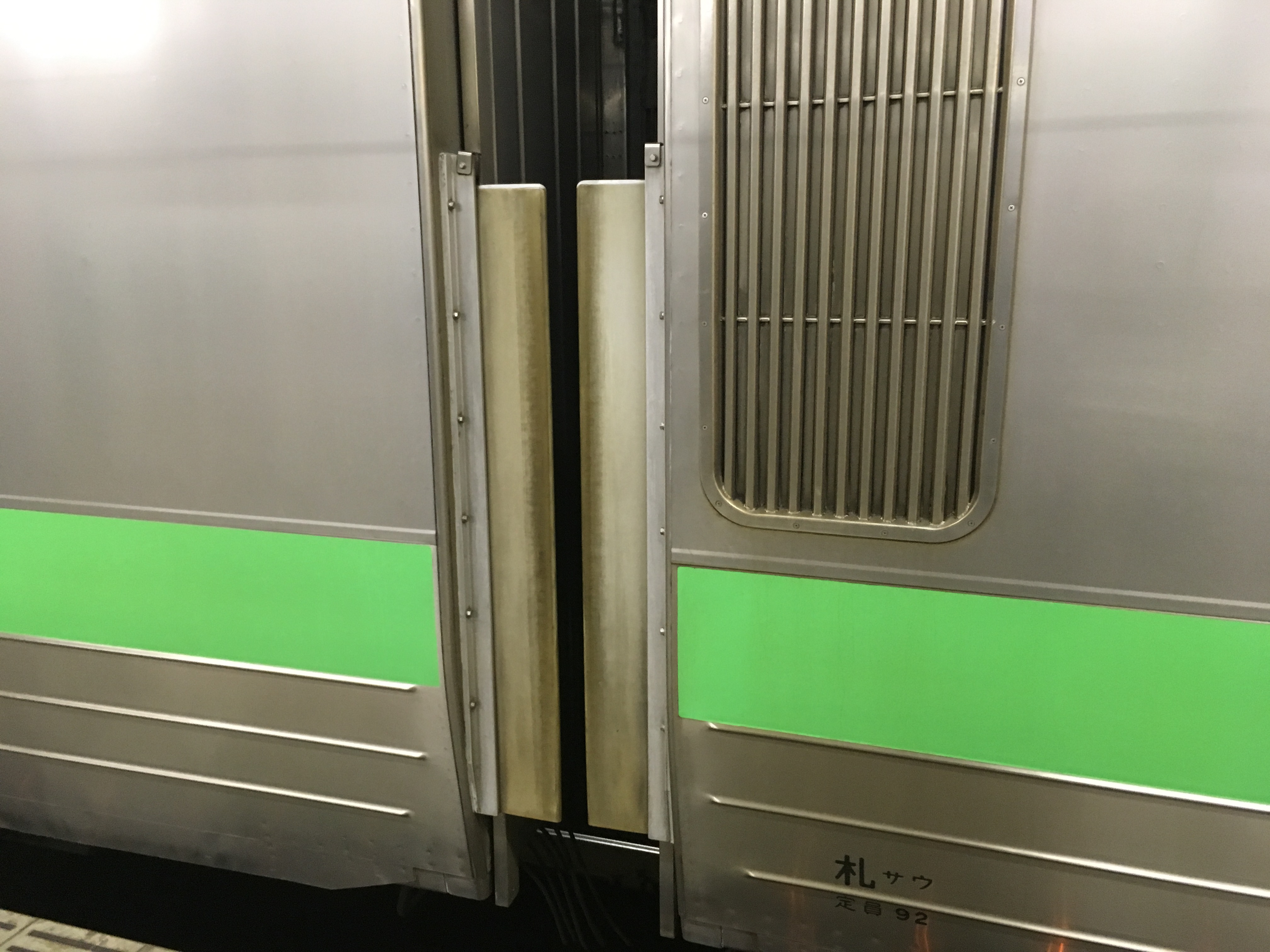 F-3103+F-3203のモハ721-3203・クハ721-3203のものです。 2017.10.13(金)撮影